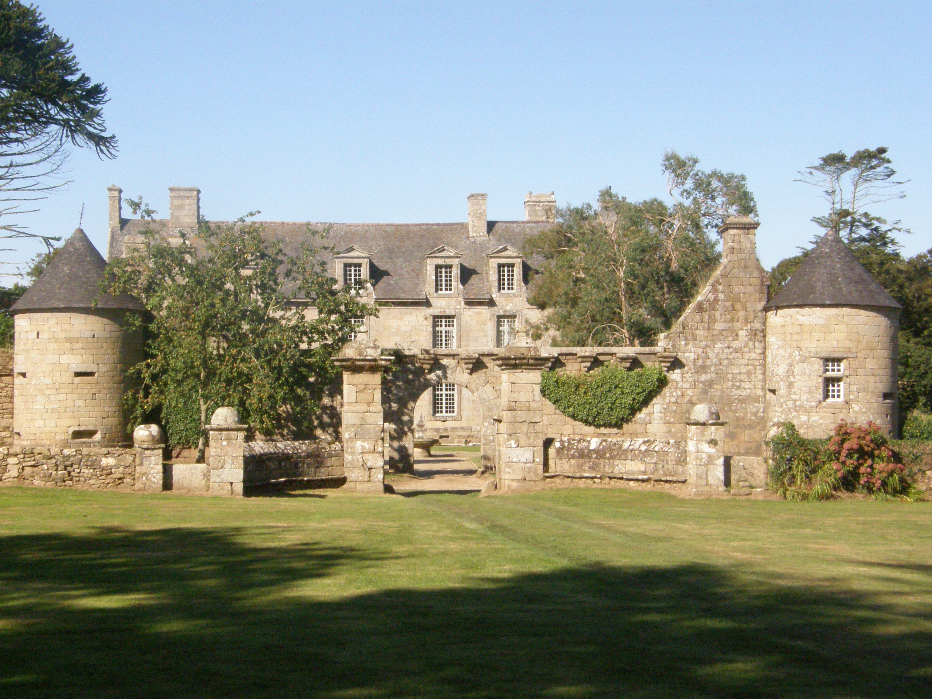 Vue face sud du manoir de Kérouartz en LANNILIS